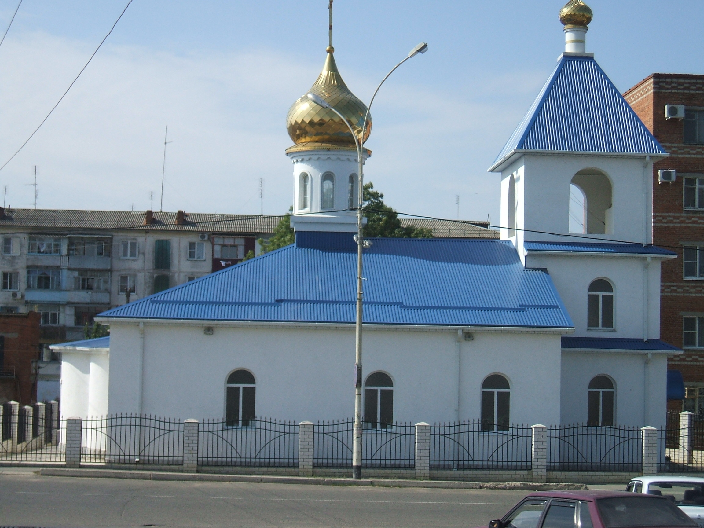 церковь Александра Невского в г.Темрюк